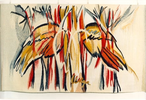 Tapijt De Engel, 1990